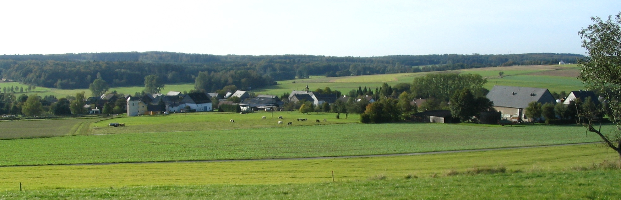 Kludenbach, Hunsrück von Südosten